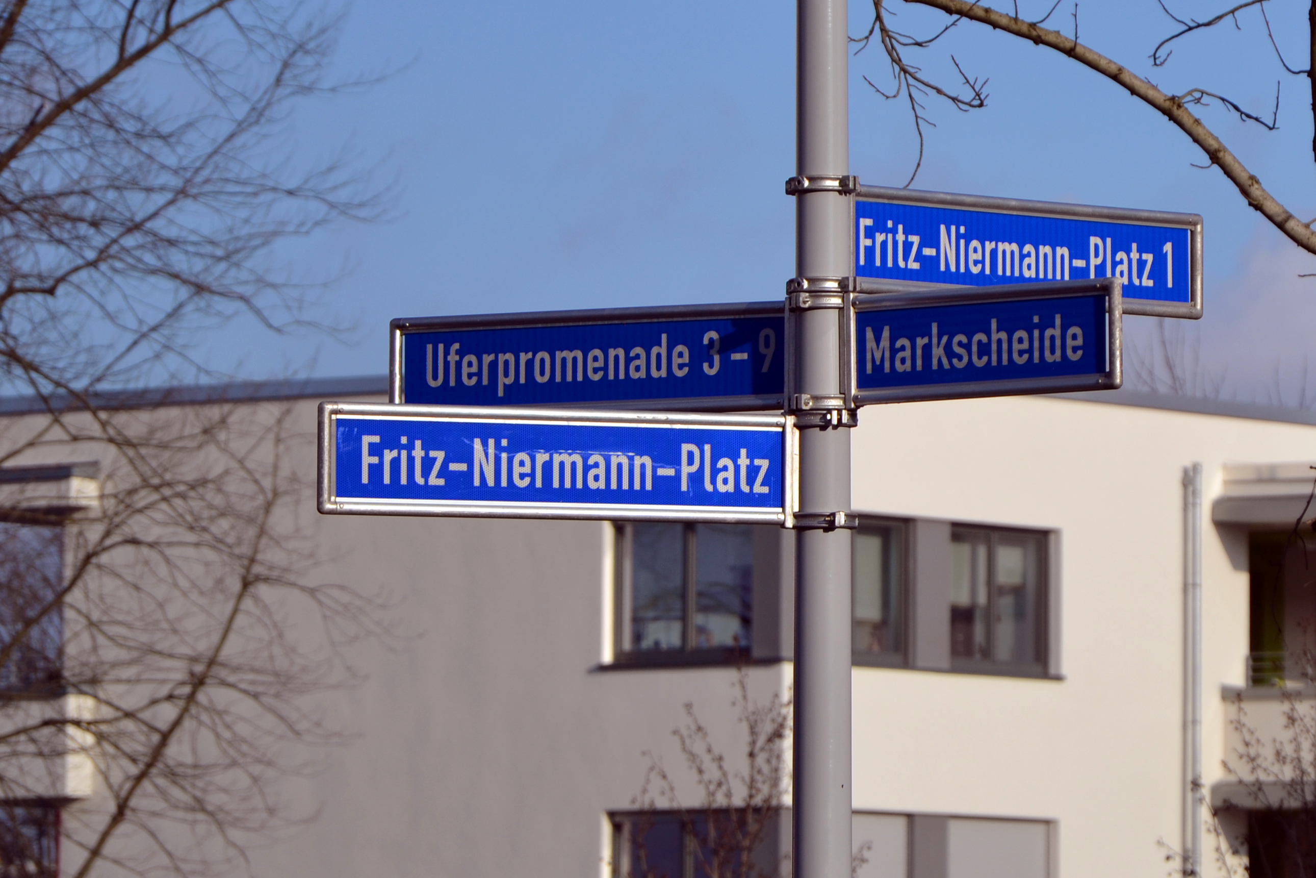 Straßenschilder in Essen-Altendorf erinnern an Fritz Niermann: Er nahm zusammen mit Gerhard Marquardt im Zweiten Weltkrieg hier geflohene Frauen aus dem KZ-Außenlager Humboldtstraße in Essen-Fulerum auf. Sein Haus ist 2011 abgerissen worden.